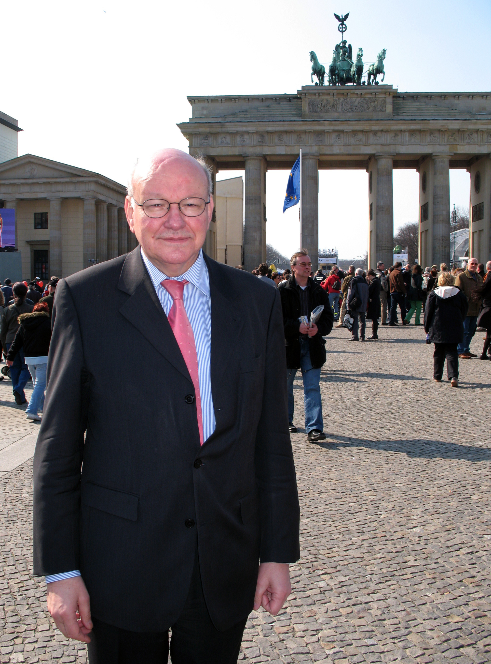 Walter Momper vor Brandenburger Tor, beim Europafest.